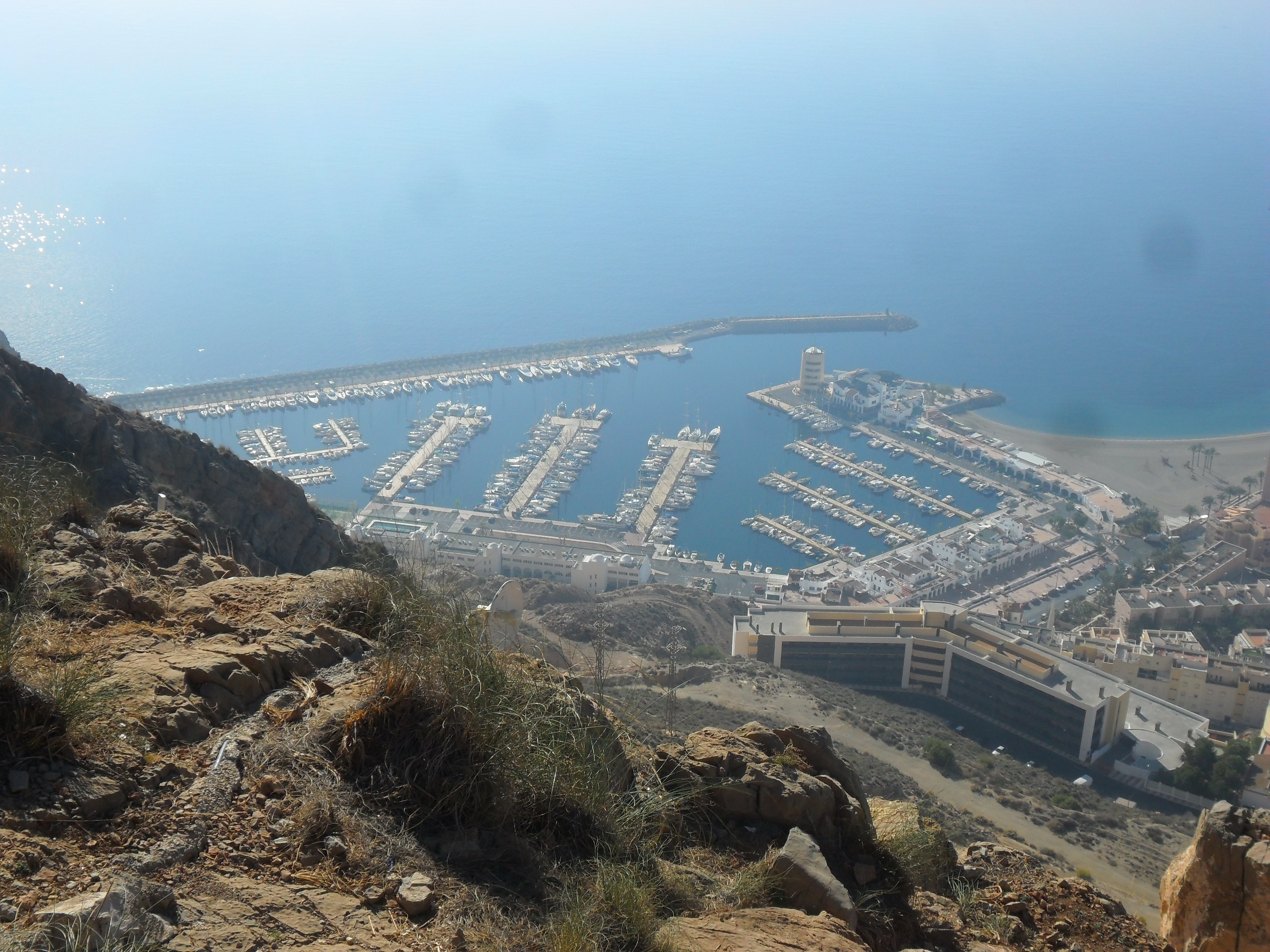 Puerto de Aguadulce